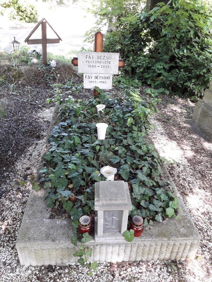 Fáy Dezső festőművész, grafikus, illusztrátor; a Magyar Könyv- és Reklámművészek Egyesületének alelnöke (1888-1954)